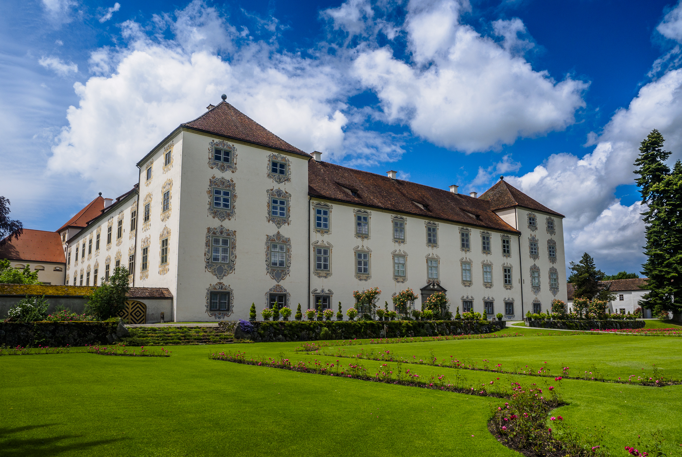 Schloss Zeil bei Leutkirch